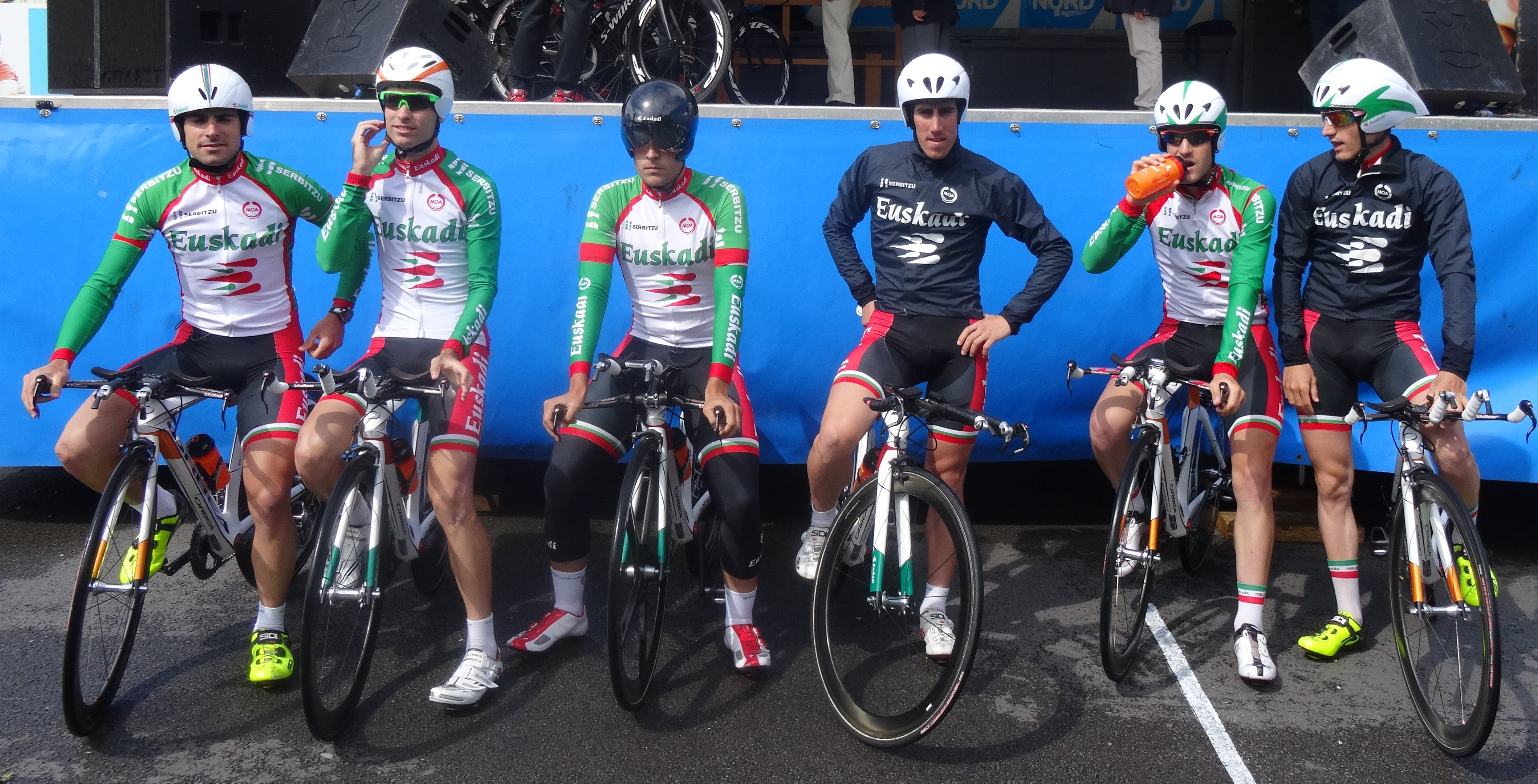 Reportage photographique réalisé le vendredi 23 mai 2014 à l'occasion du départ de la première étape du Paris-Arras Tour 2014 à Lens, Pas-de-Calais, Nord-Pas-de-Calais, France.